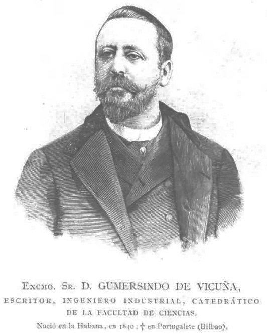 Retrato de Gumersindo de Vicuña, recogido en la revista española La Ilustración Española y Americana.